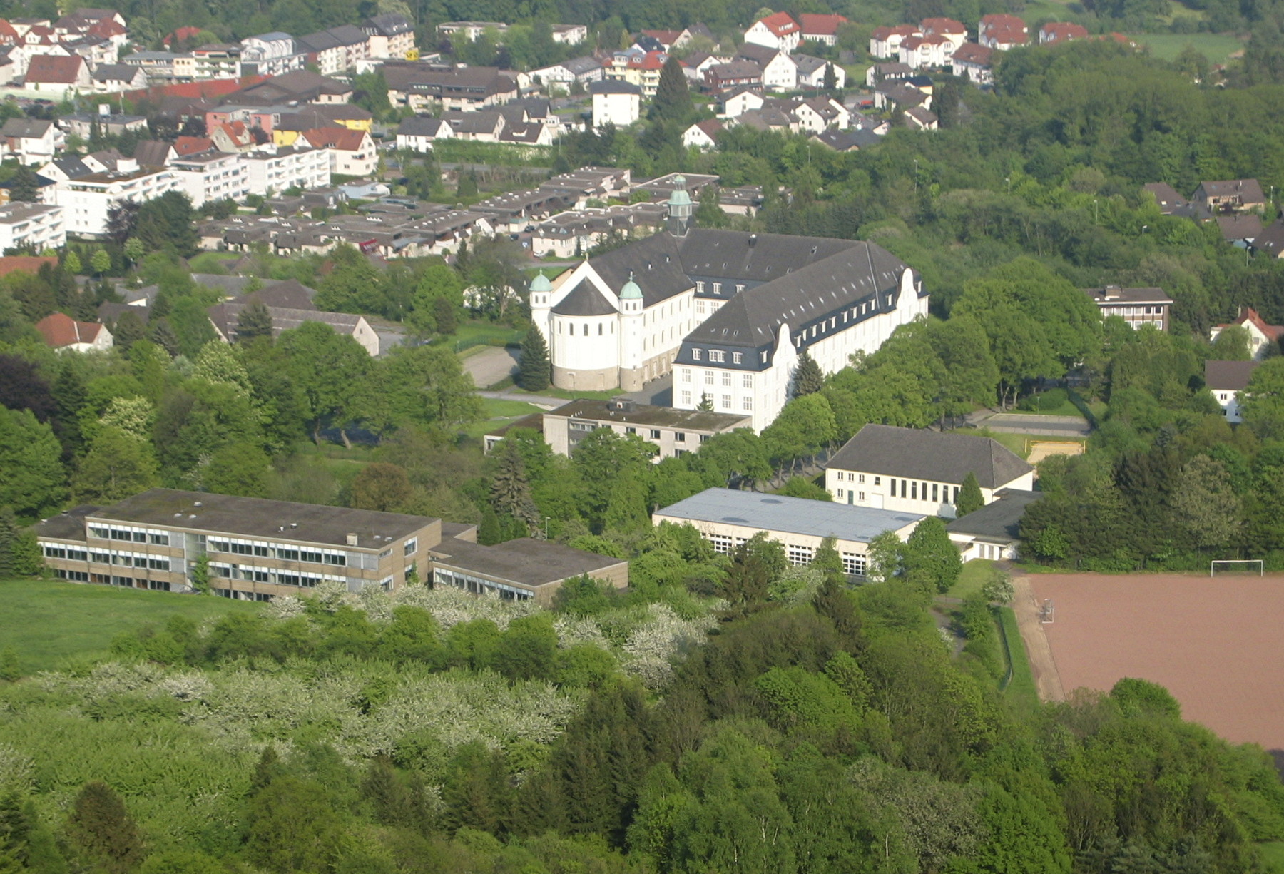 Blick vom Kaiser-Karls-Turm (von Westen, Luftlinie etwa 700 m) aufs Gymnasium St. Xaver in Bad Driburg, Nordrhein-Westfalen, Deutschland